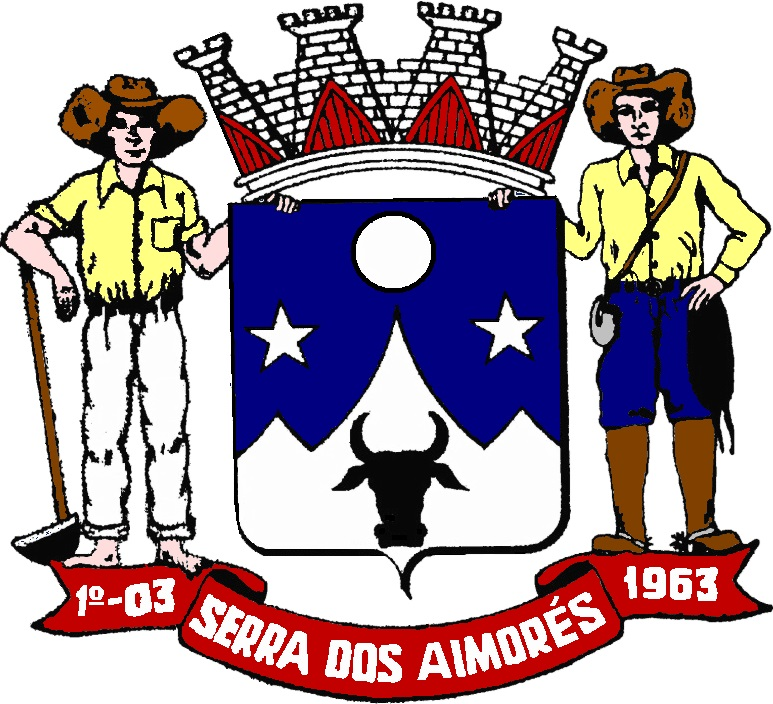 Brasão da cidade de Serra dos Aimorés